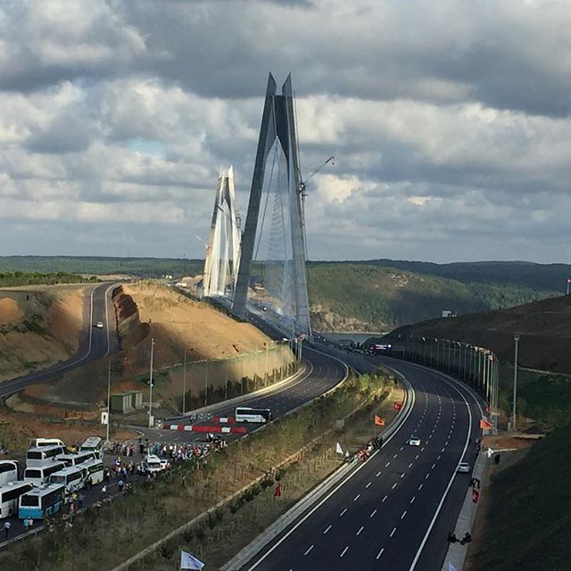 Yavuz Sultan Selim Köprüsü, Turkey